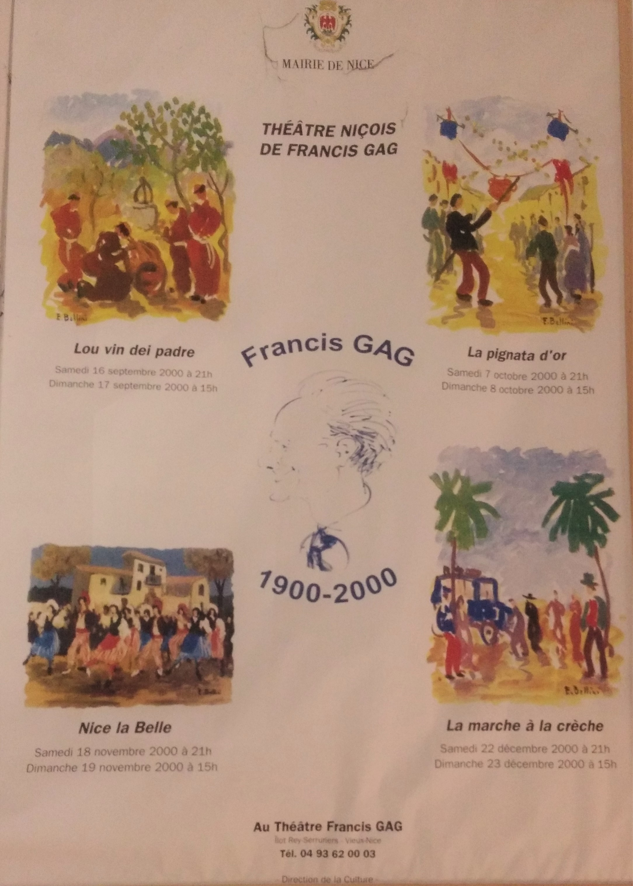 Affiche représentations théâtre Francis Gag Noel 2000